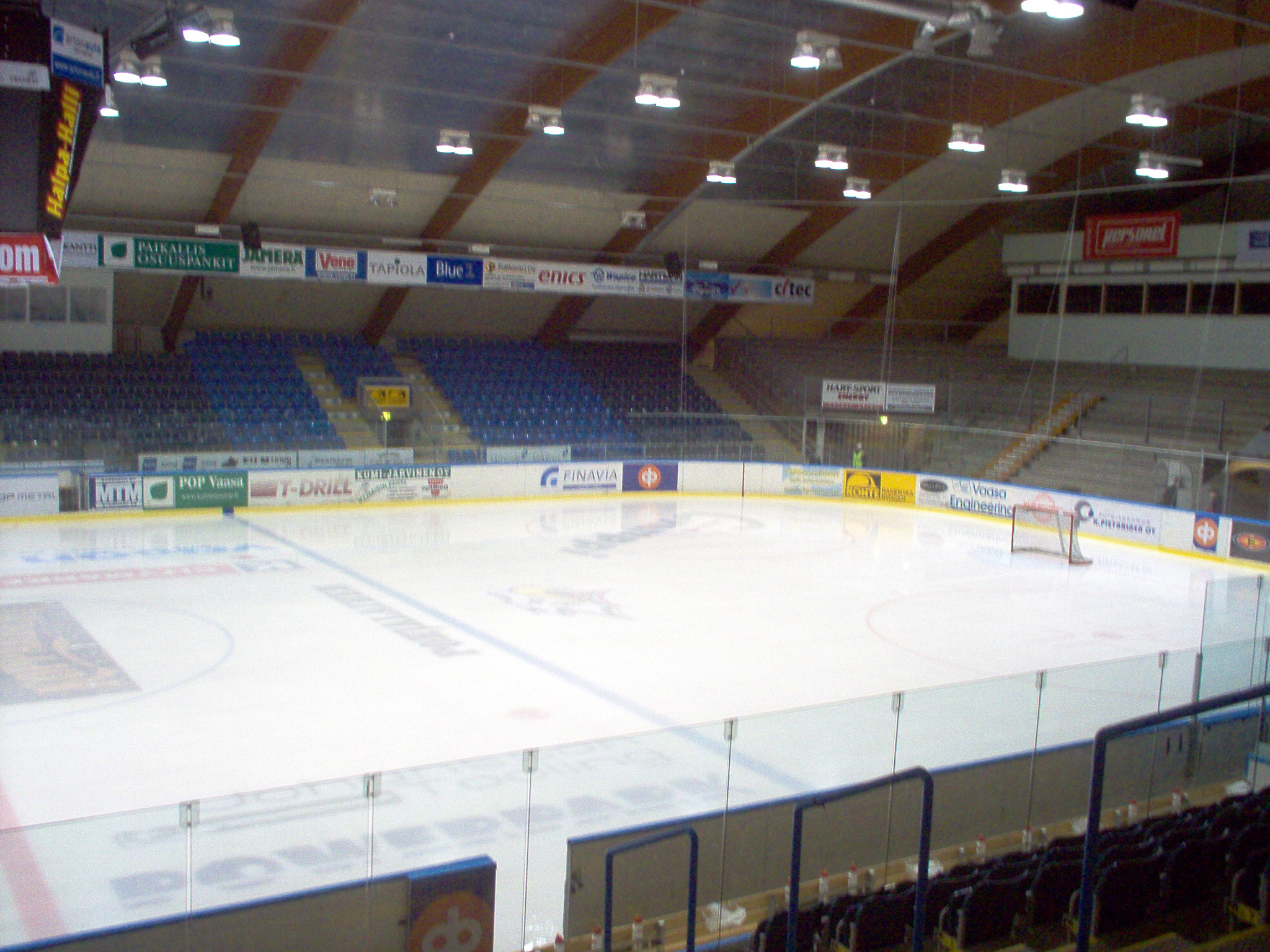 Vaasan jäähalli eli Vaasa Arena sisältä